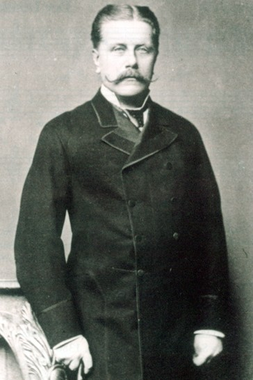 Maximilian Karl Theodor Graf von Holnstein, 1835-1895, Kgl. Bayr. Oberststallmeister, enger Berater von König Ludwig II. von Bayern